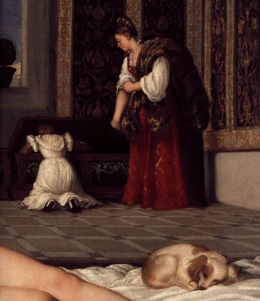 detail